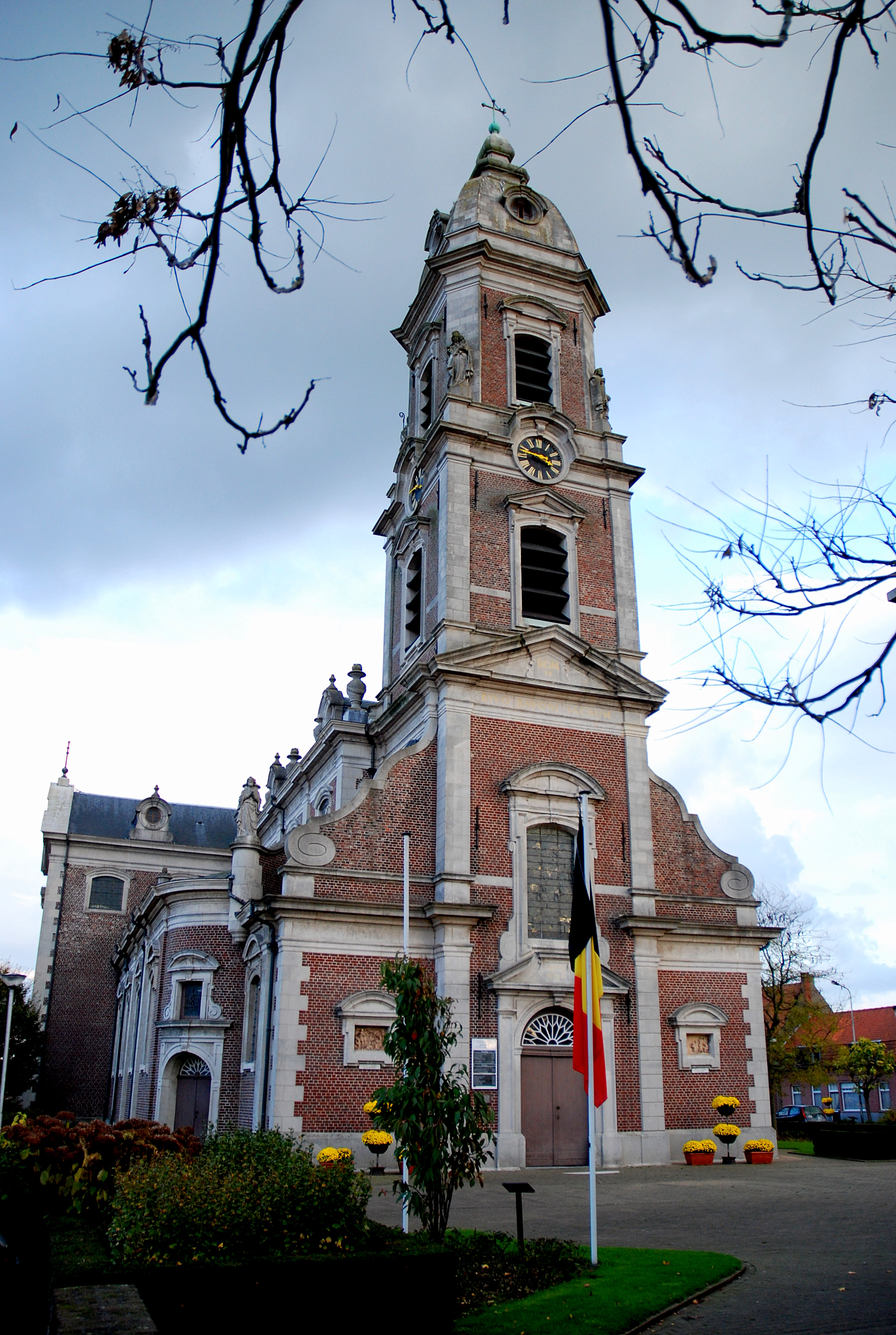 De Sint Bavokerk te Kanegem, België